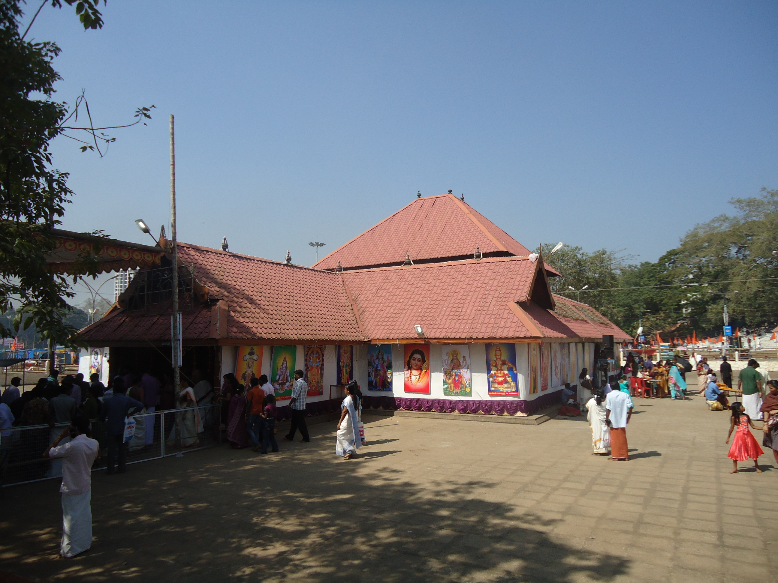 Aluva Manappuram Siva Temple Main